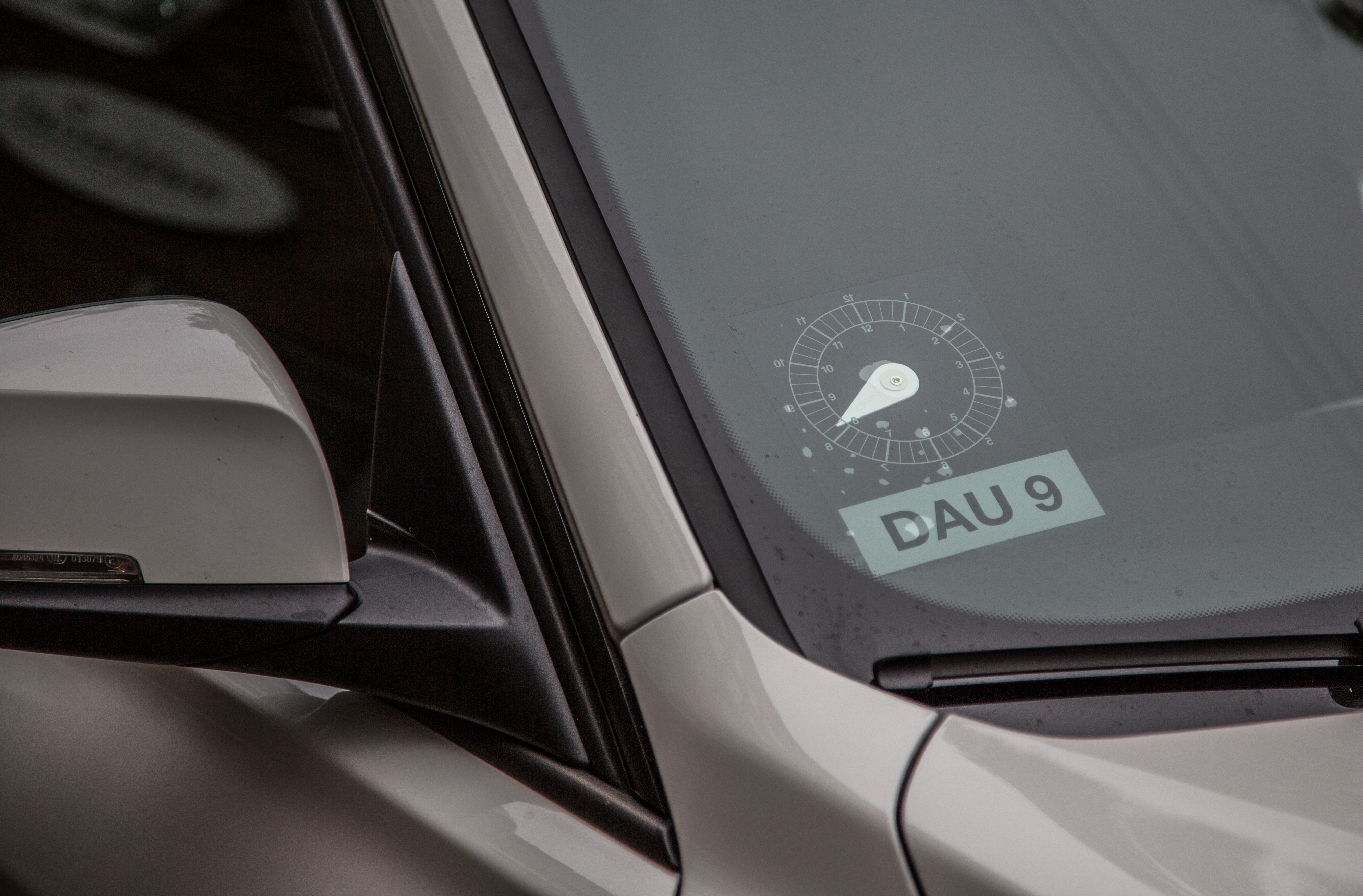 Copenhagen, Denmark